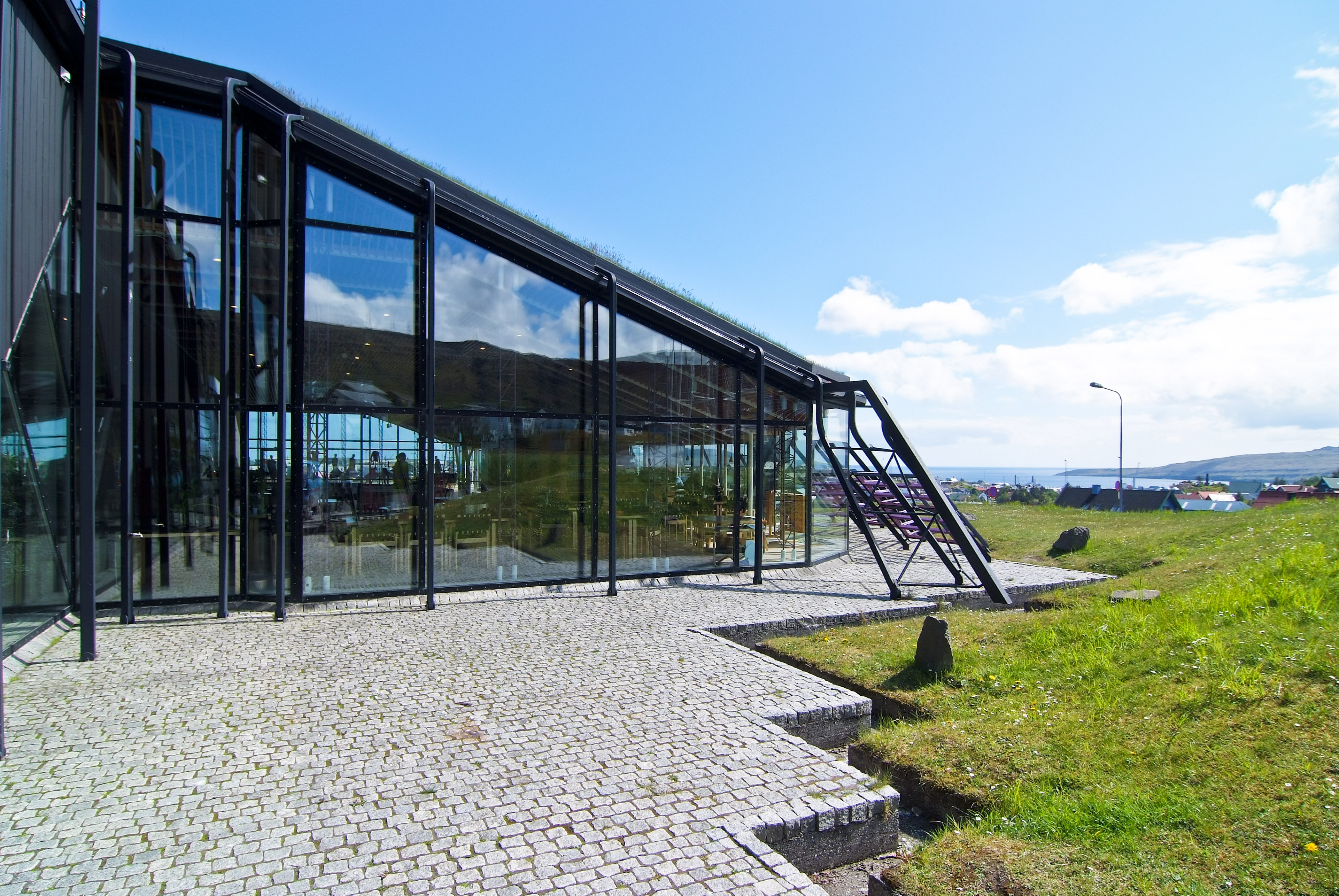 Norðurlandahúsið